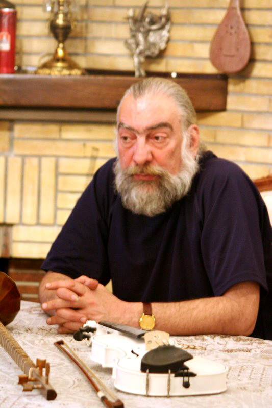 Parviz_Meshkatian_in_Tehran